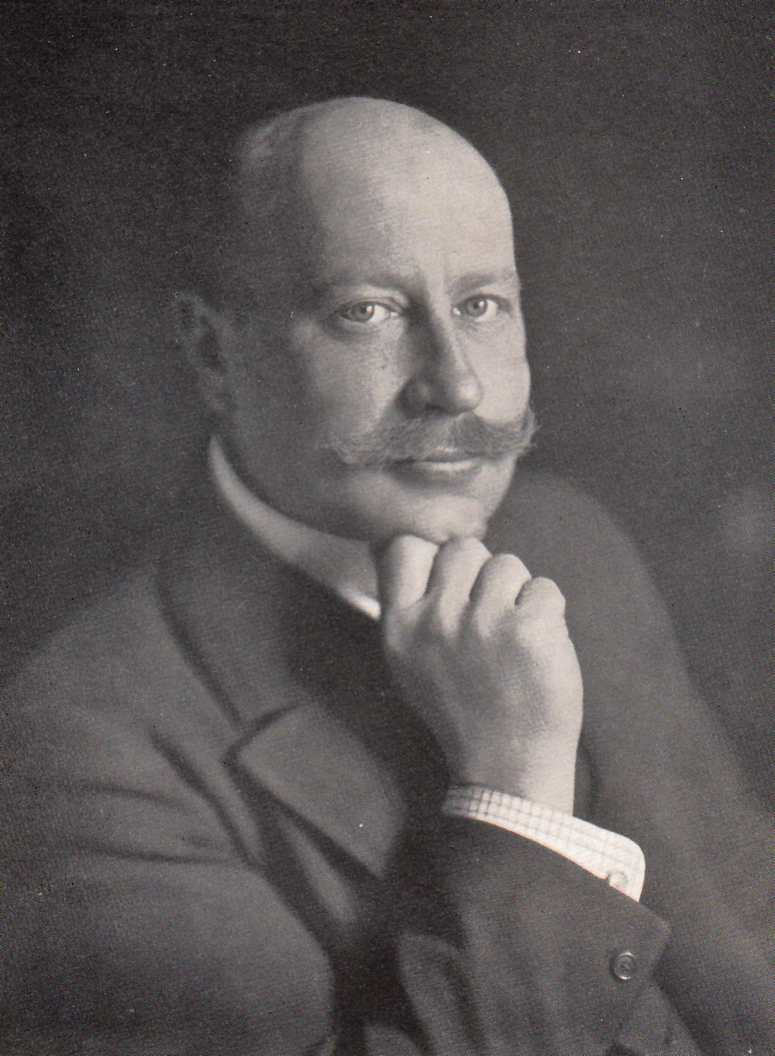 Porträt von Hans Wilhelm Zanders, Papierfabrikant